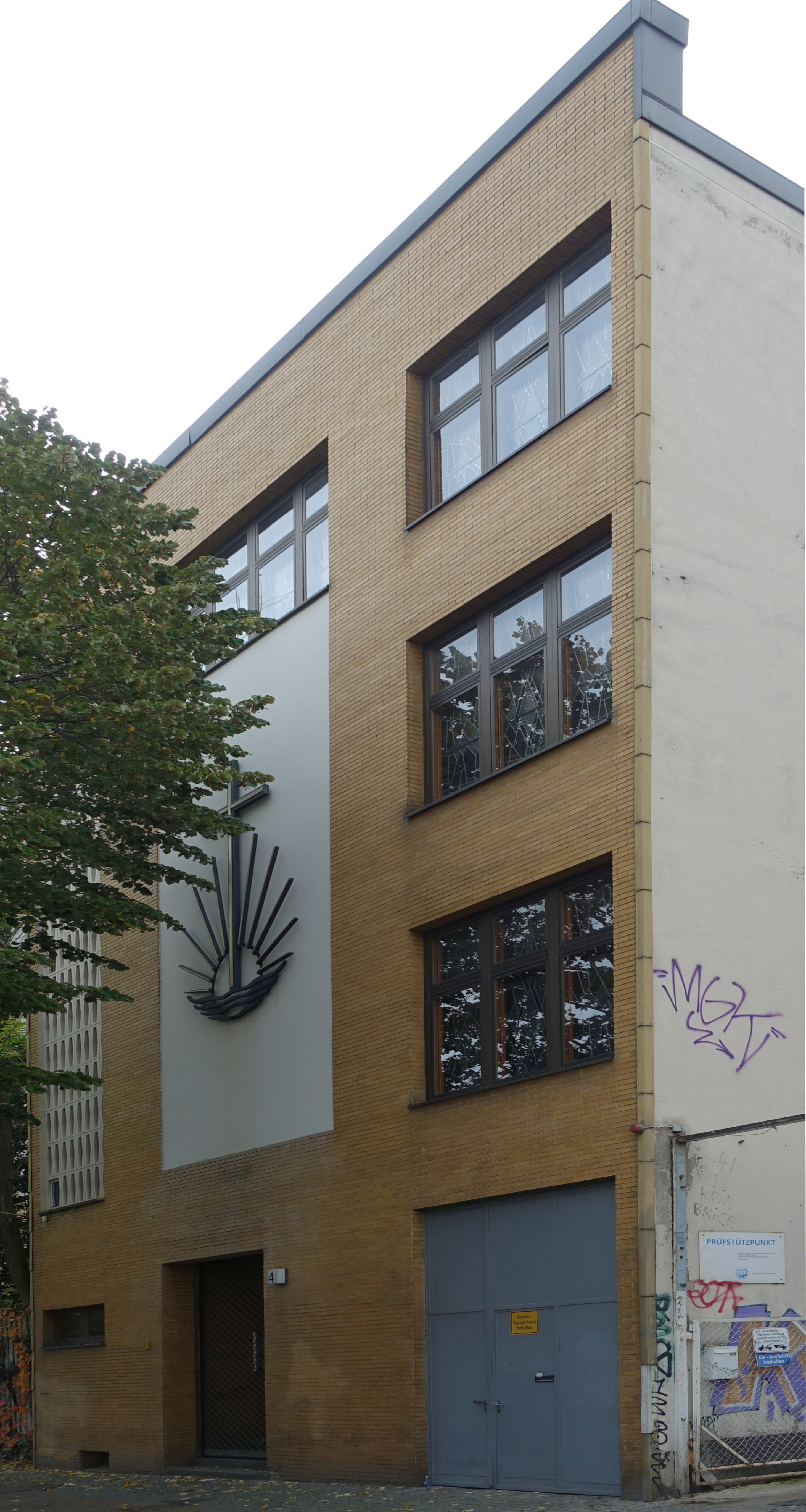 Straßenansicht der Neuapostolischen Kirche